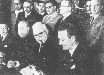 Foto del año 1960 de los Gobernadores Uranga de (Entre Ríos) y Sylvestre Begnis (Santa Fe)